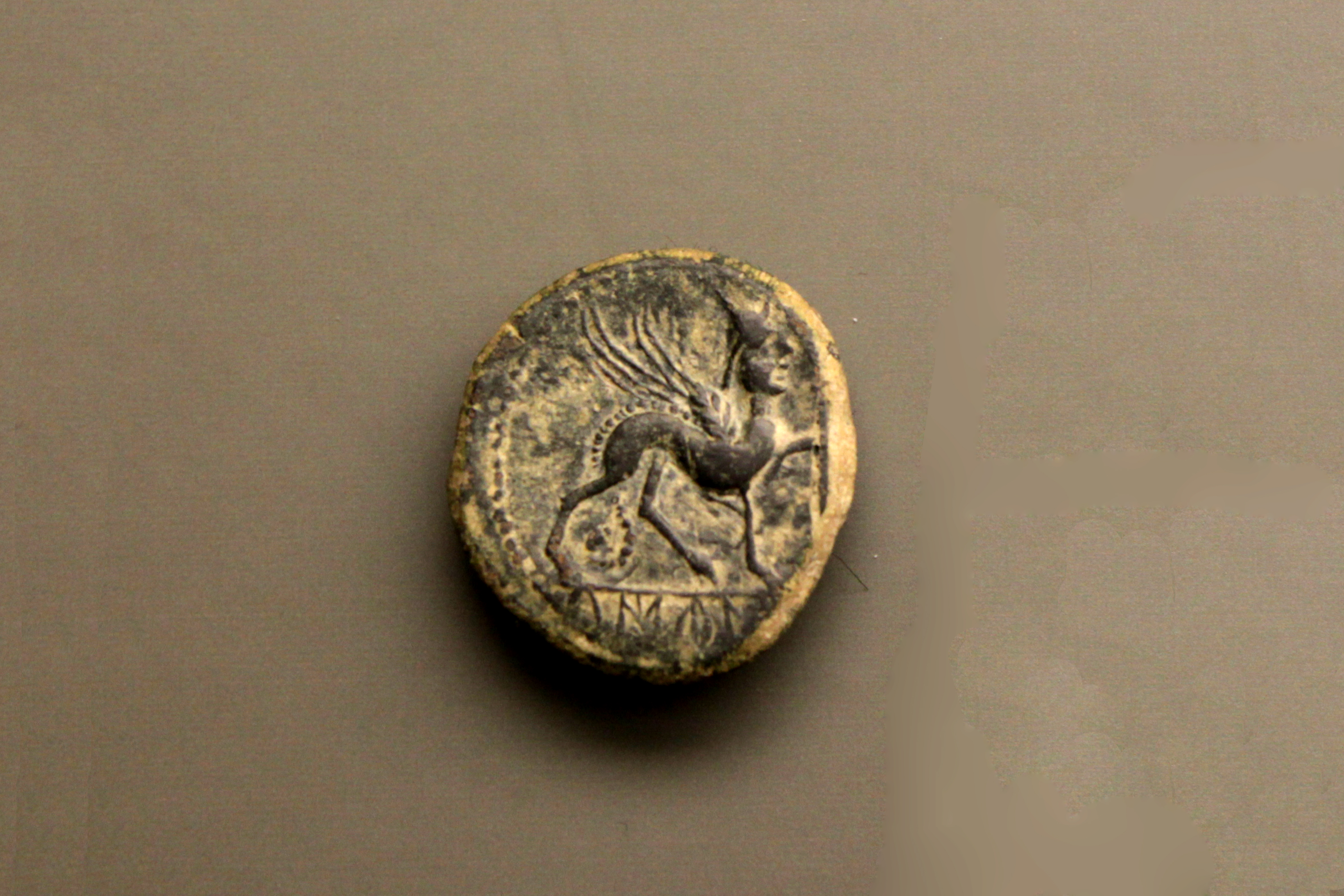 Moneda ibera de Cástulo, siglos II al I aC. Depositada en el Museo de prehistoria de Valencia, Comunidad valenciana, España.